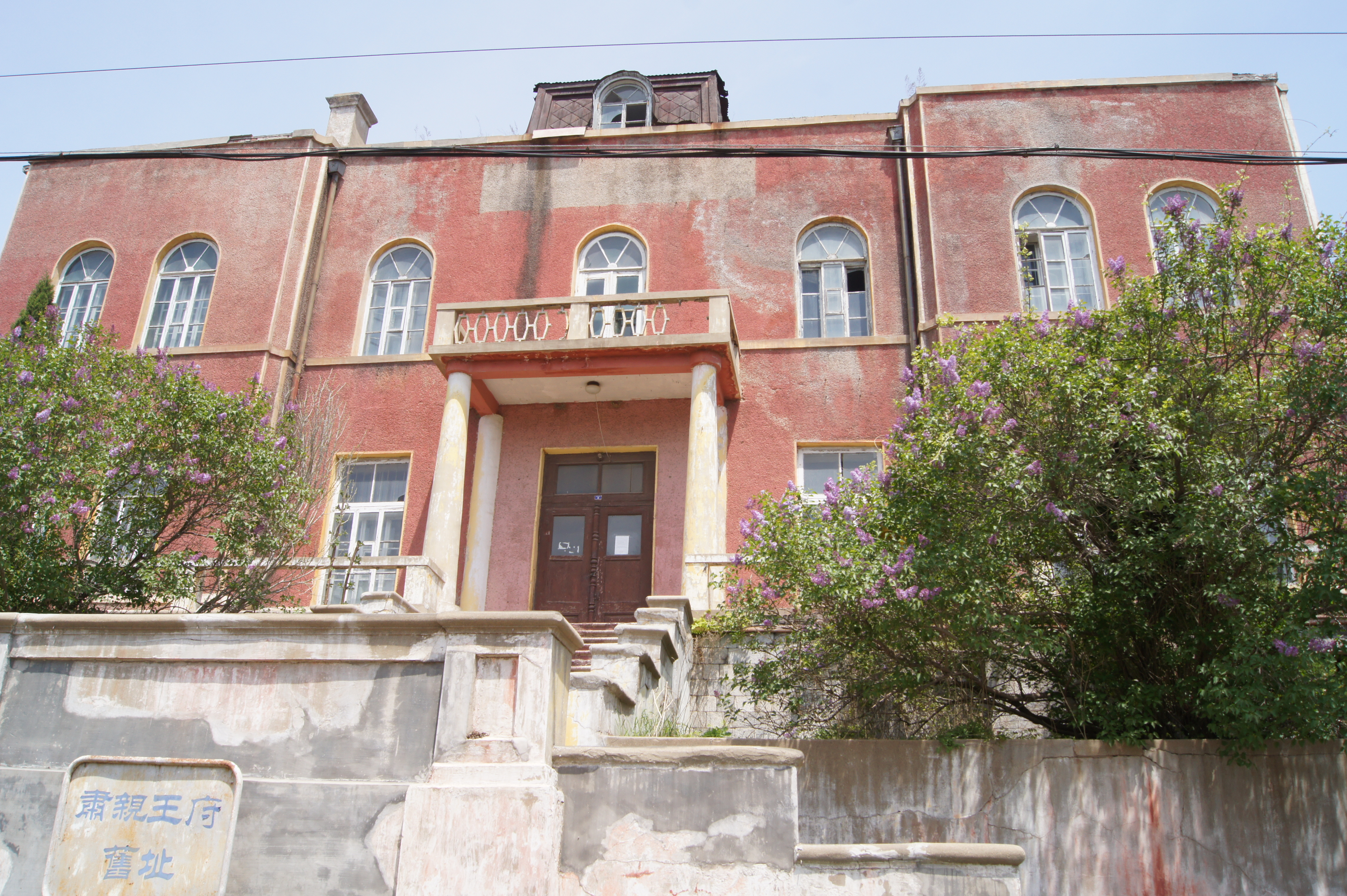 旅順のja:粛親王邸跡